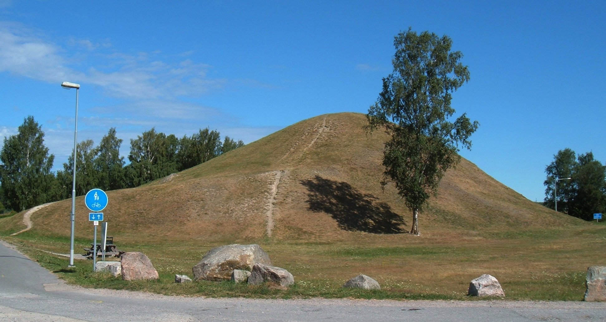 Ströbo hög (RAÄ-nummer Köping 56:1) är belägen utmed länsväg 250 där denna korsar E18 utanför Köping, Köpings kommun, Västmanlands län, Västmanland, Sverige.